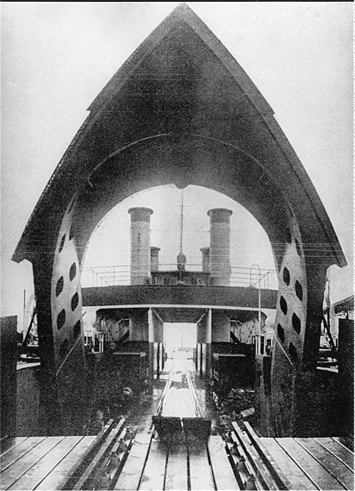 Eisenbahnfähre Friedrich Franz IV vor der Beladung mit Eisenbahnwaggons